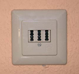 Telefonsteckdose